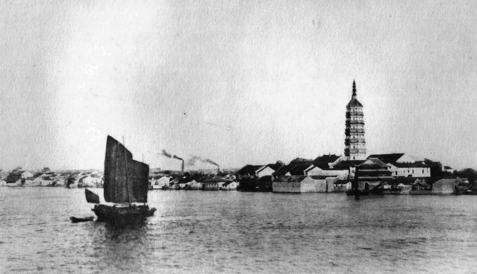 Zhenfeng Pagoda (Zhènfēng Tǎ, 振风塔 = 振風塔) in Anqing (安慶市).